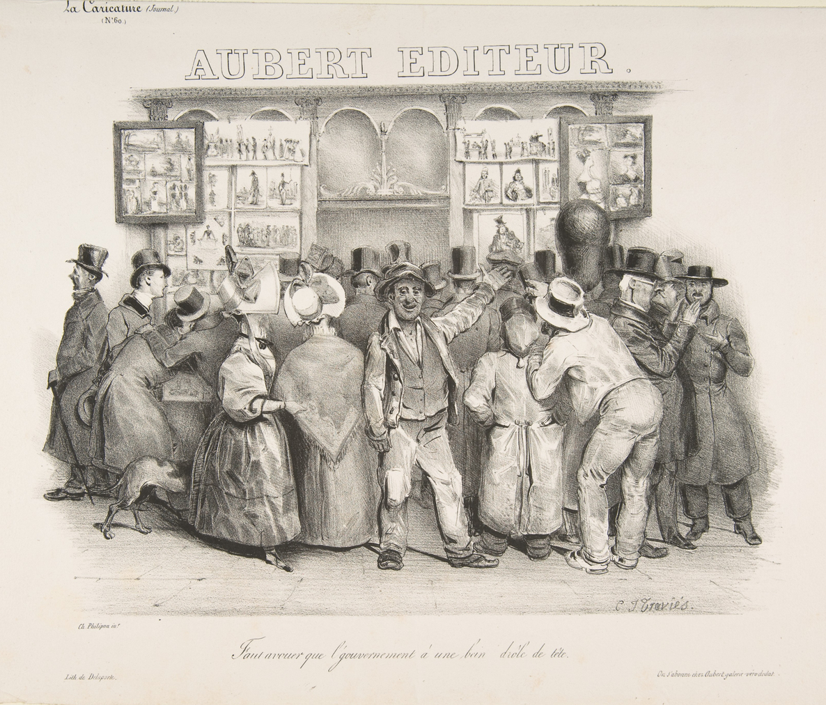 Lithographie : Faut avouer que l'gouvernement à une bien drôle de tête